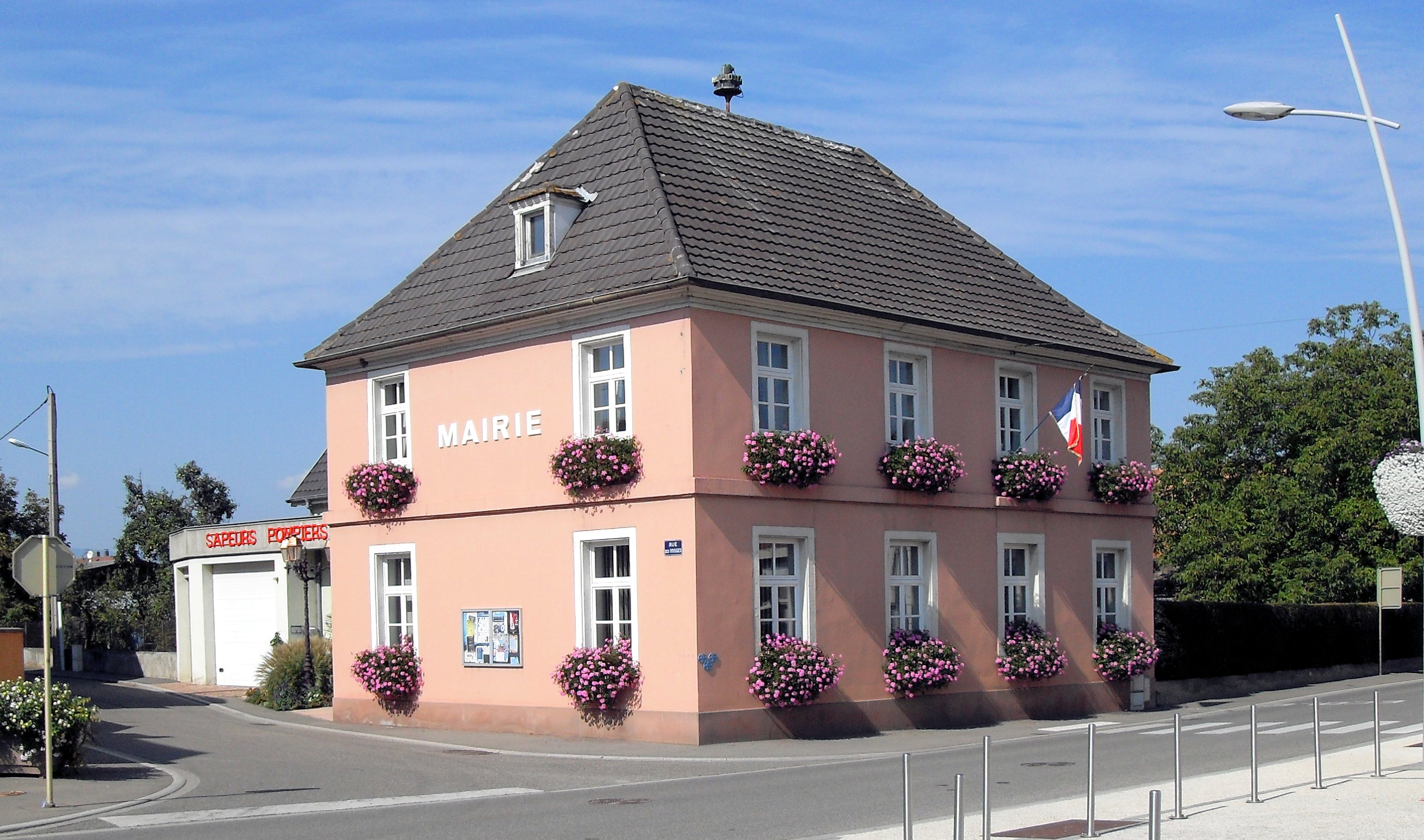 La mairie de Bischwihr